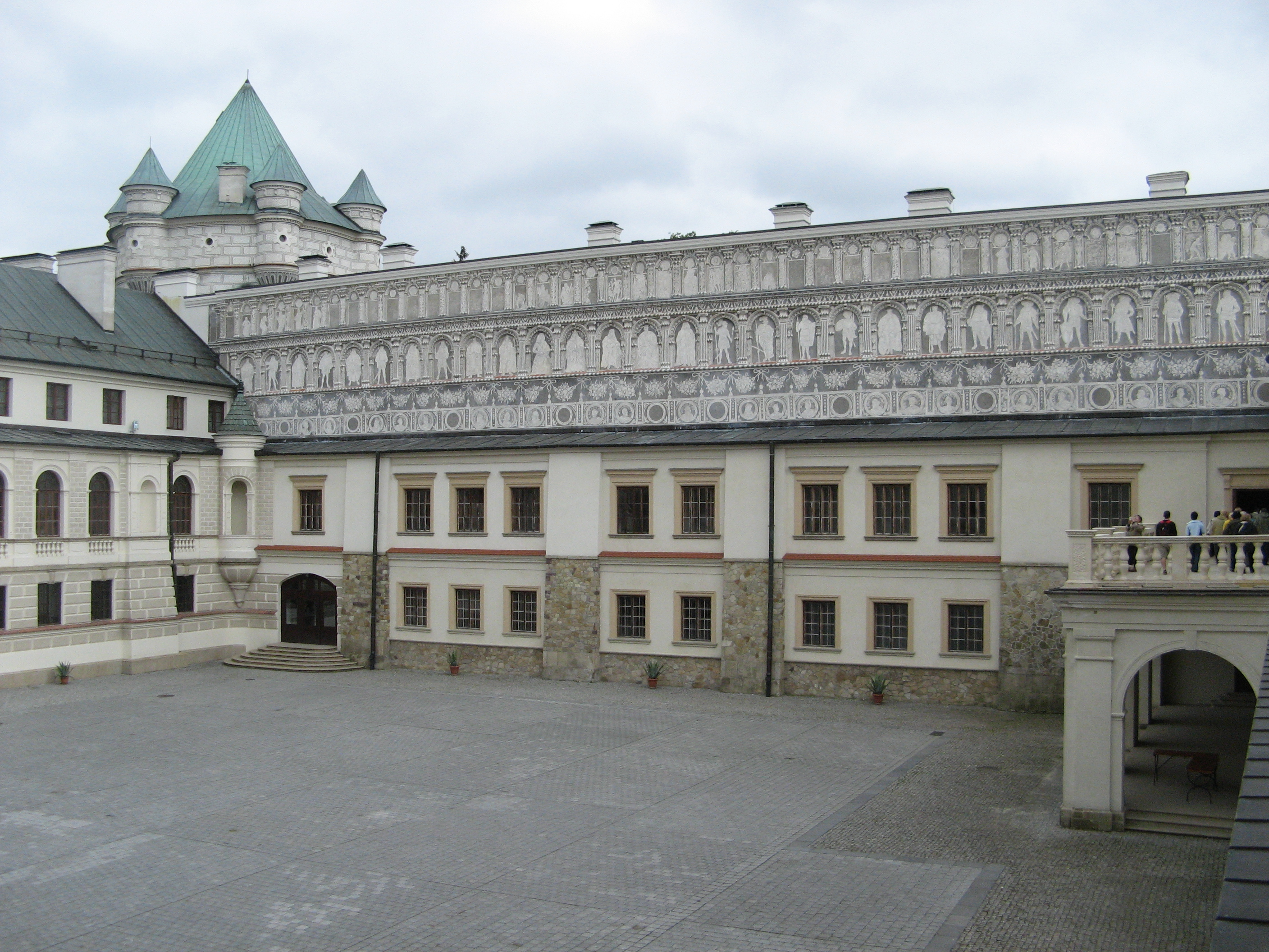 Dziedziniec zamku w Krasiczynie.